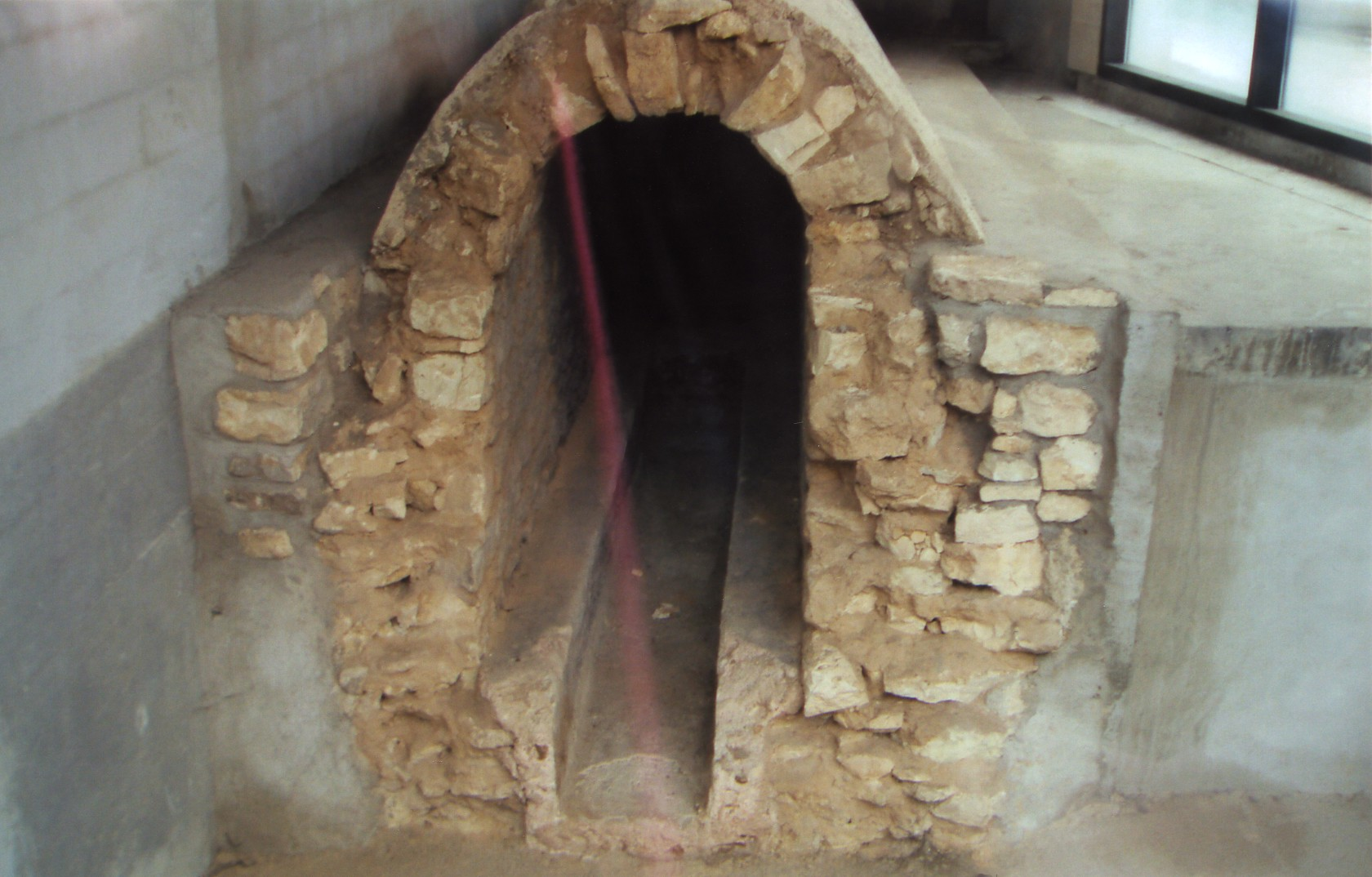 Acqueduc (près du square Montsouris)